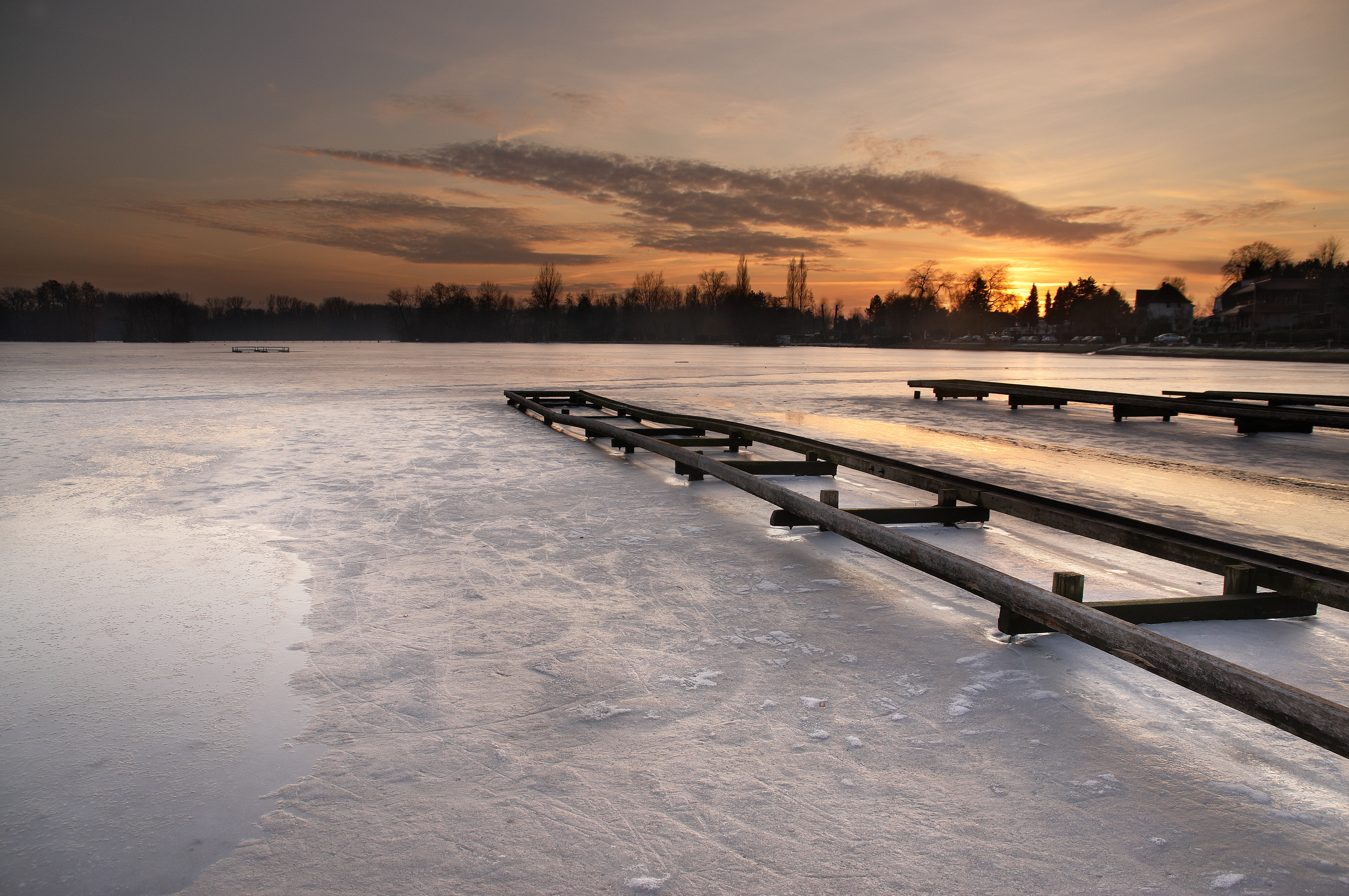 Het donkmeer in Overmere (B) tijdens de winter.